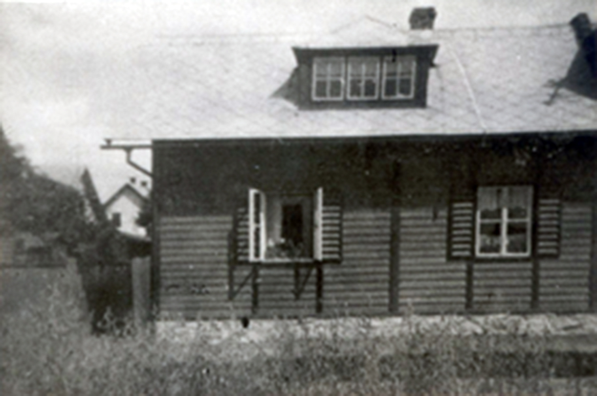 Nýrsko č. p. 398 (historická fotografie). Zde žil spisovatel Josef Holub v letech 1927 až 1946. Ze soukromého archivu Pavla Mráze, Nýrsko.